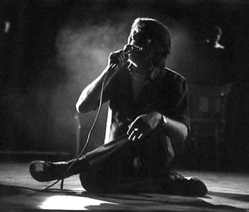 Fabrizio de André en un concierto de 1998